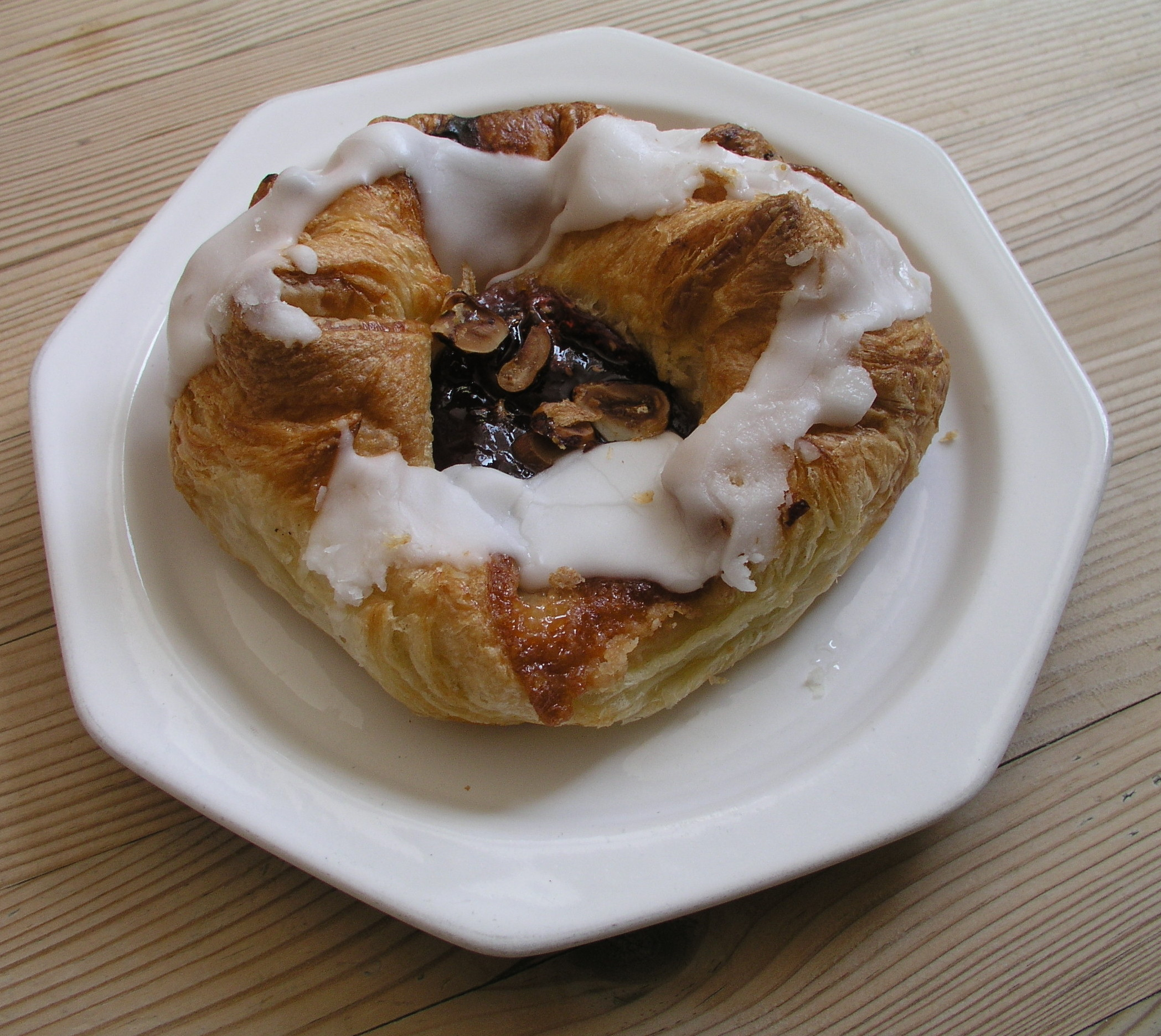 Spandauer med syltetøj